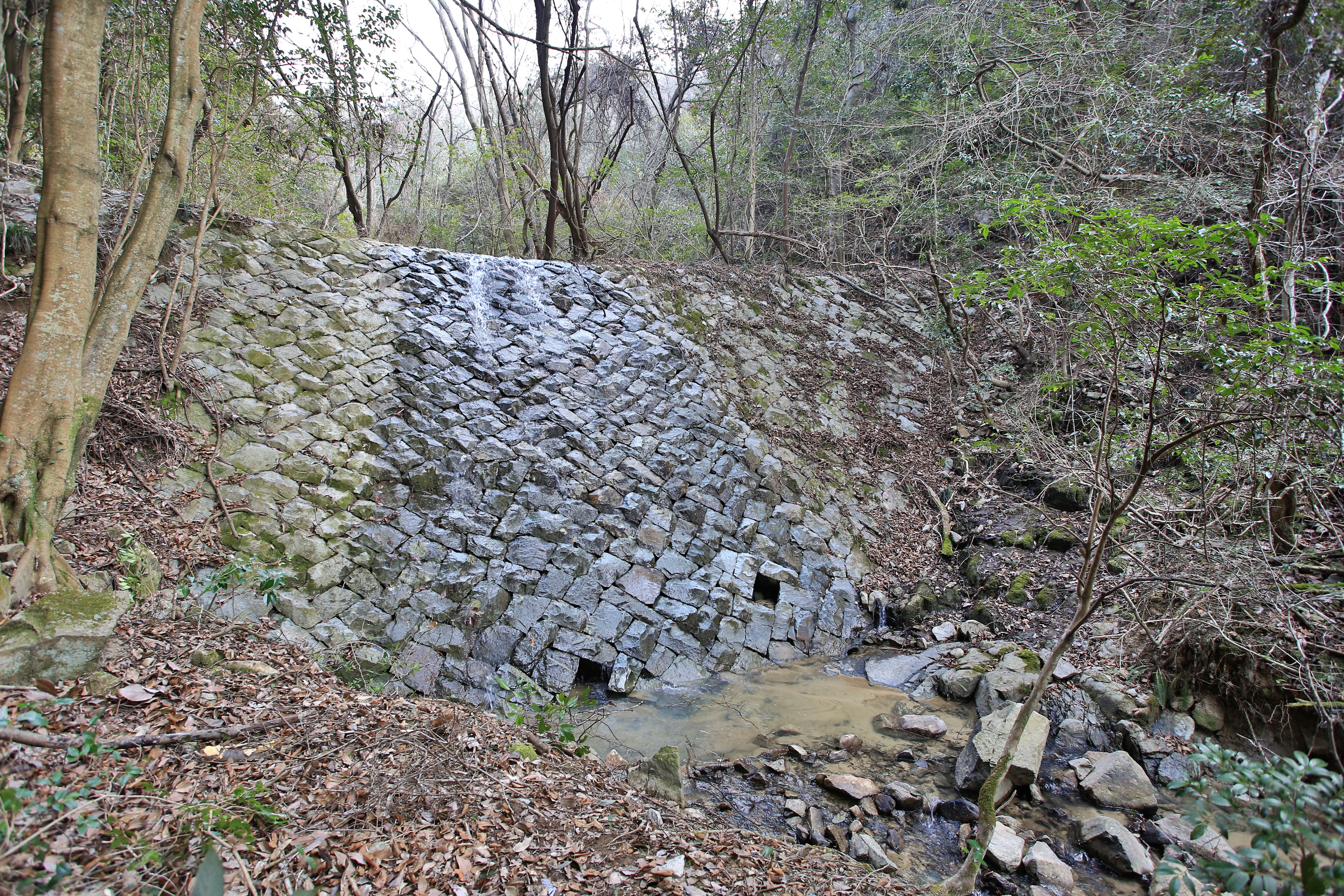 広島県福山市芦田町の大谷砂留。渓流Bの3番目の砂留。全面被覆型。